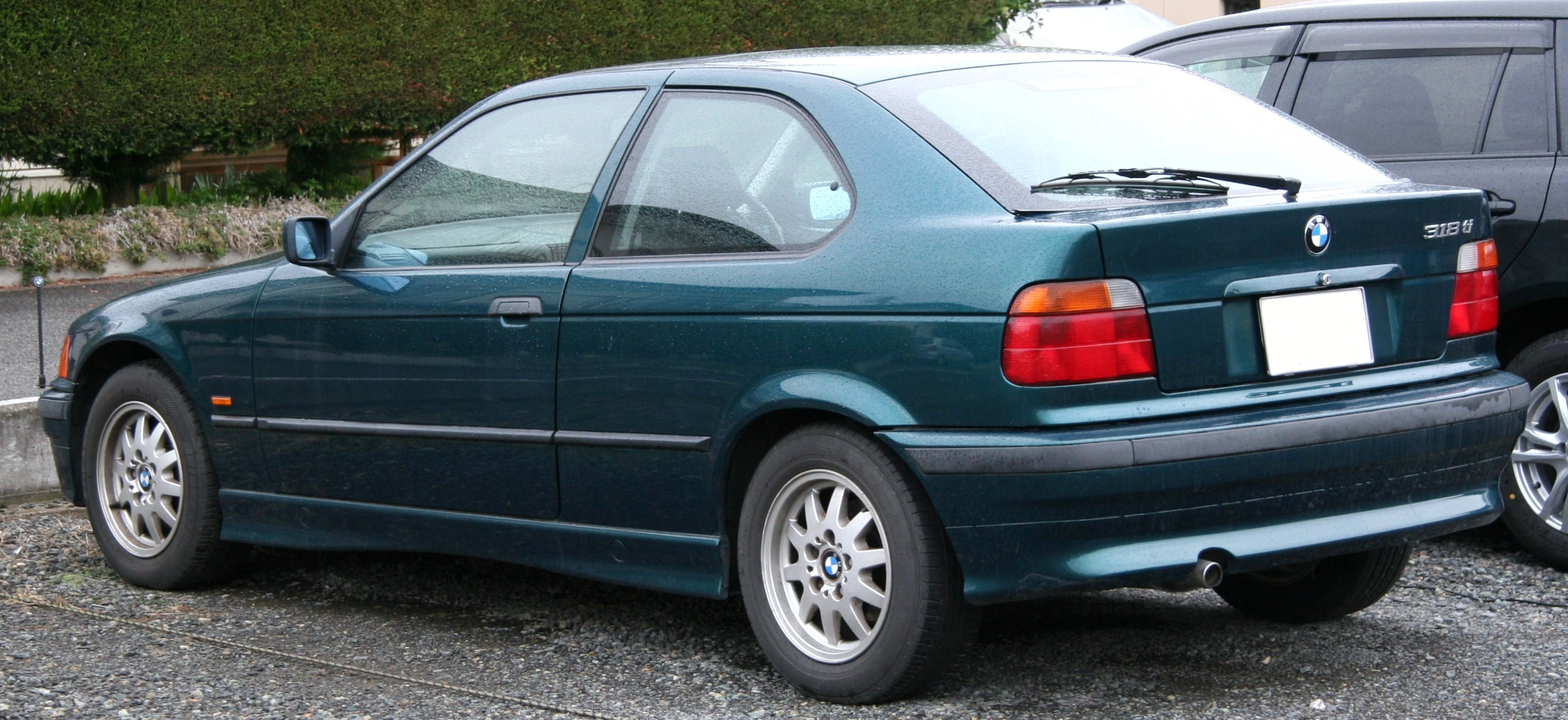 BMW 318ti